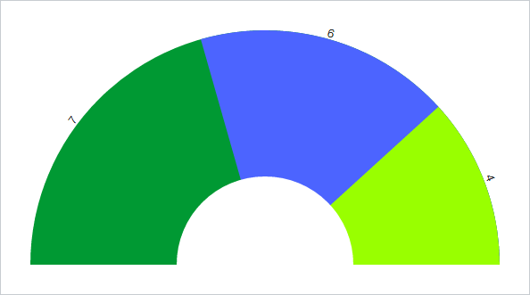 9. Vlada Federacije Bosne i Hercegovine: SDA HDZ SBB